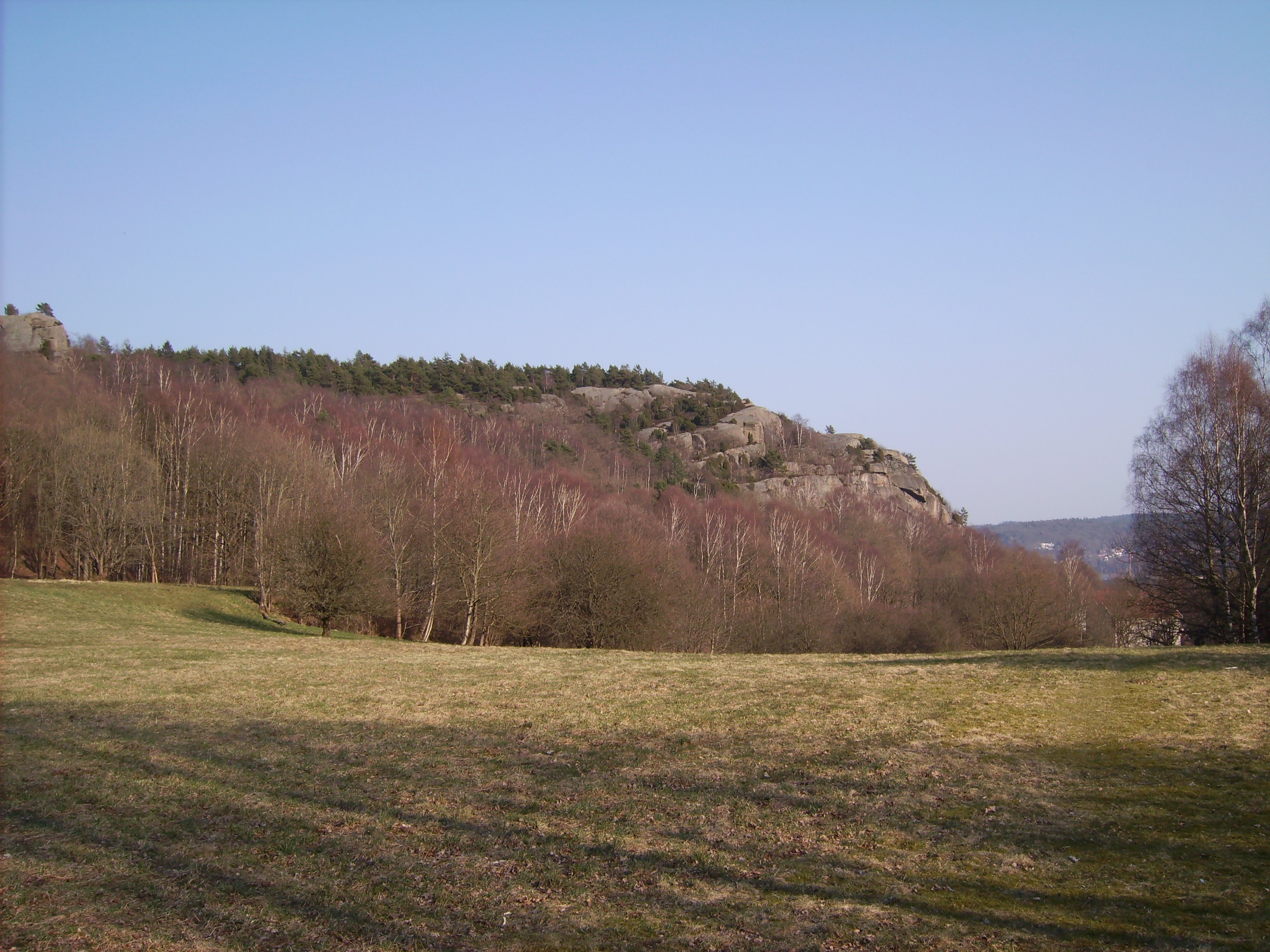 Bilden är fotograferad av Harri Blomberg. Photo by Harri Blomberg.